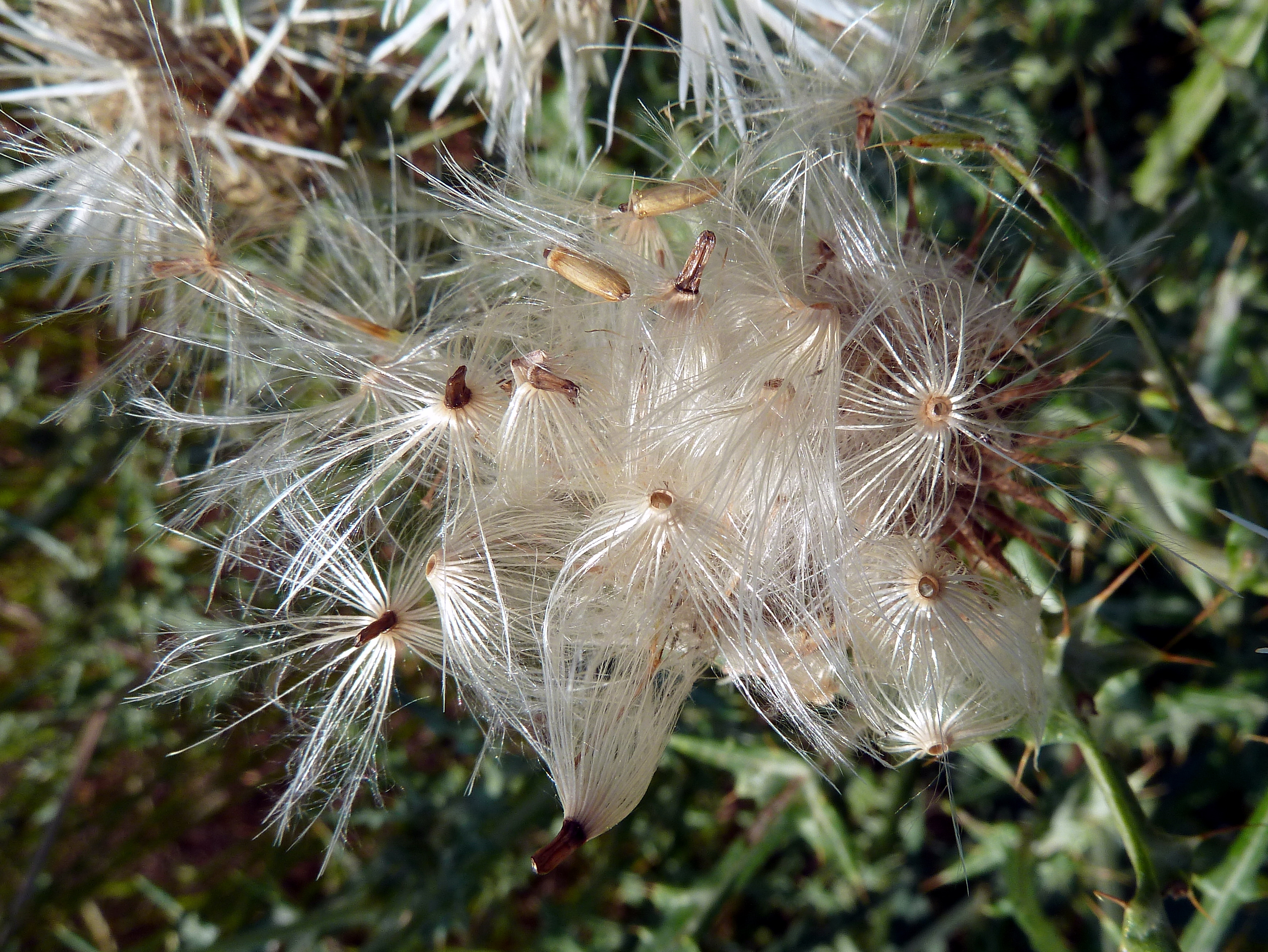 Galactites tomentosa Moench (= Galactites elegans (All.) Nyman, variedad blanca, con sus frutos (cipselas de vilano plumoso) - Camino de la Azarbe de Patricio, Albatera (Provincia de Alicante, España).